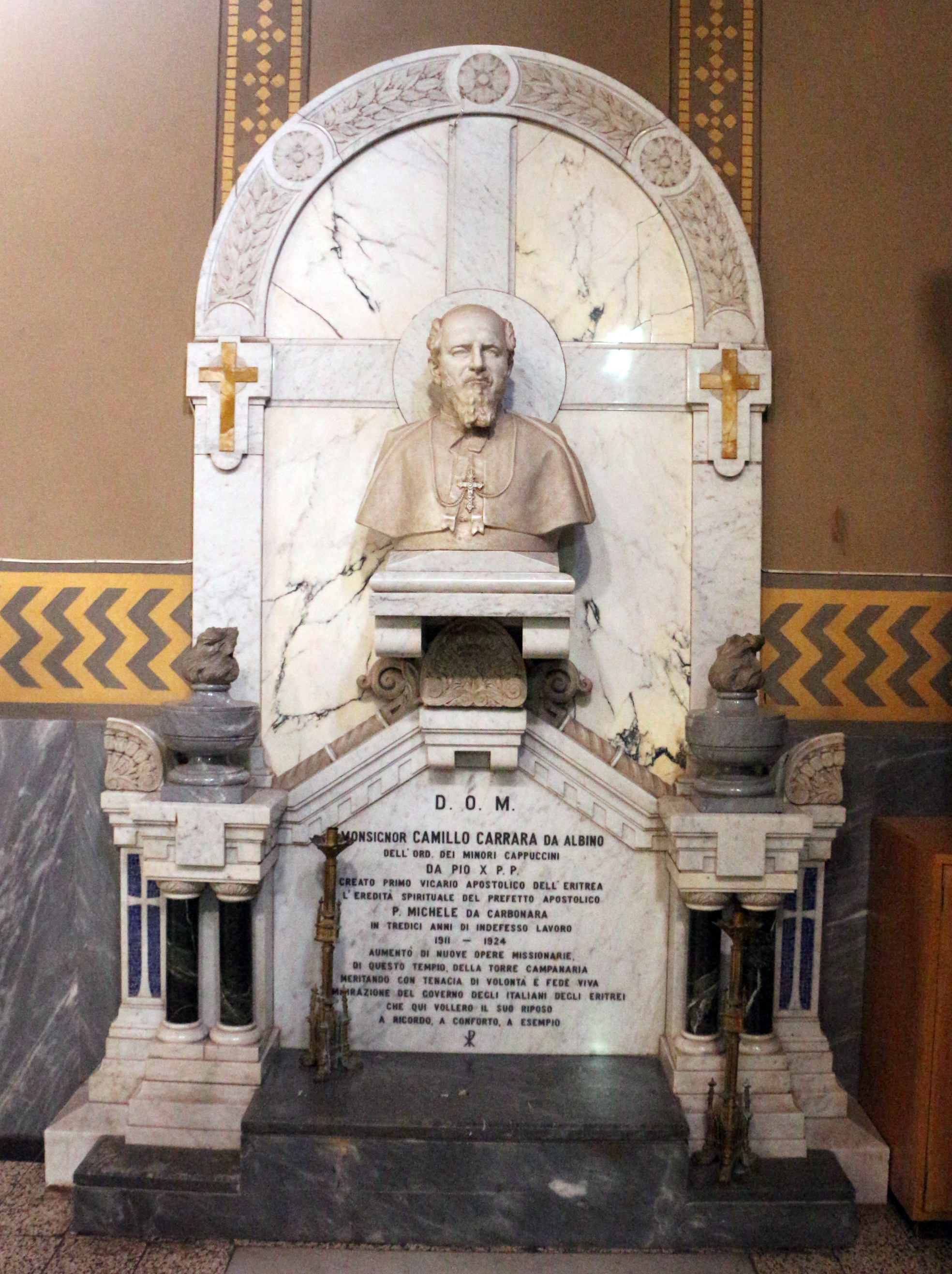 Asmara, cattedrale cattolica, interno, tomba mons. camillo carrara.JPG